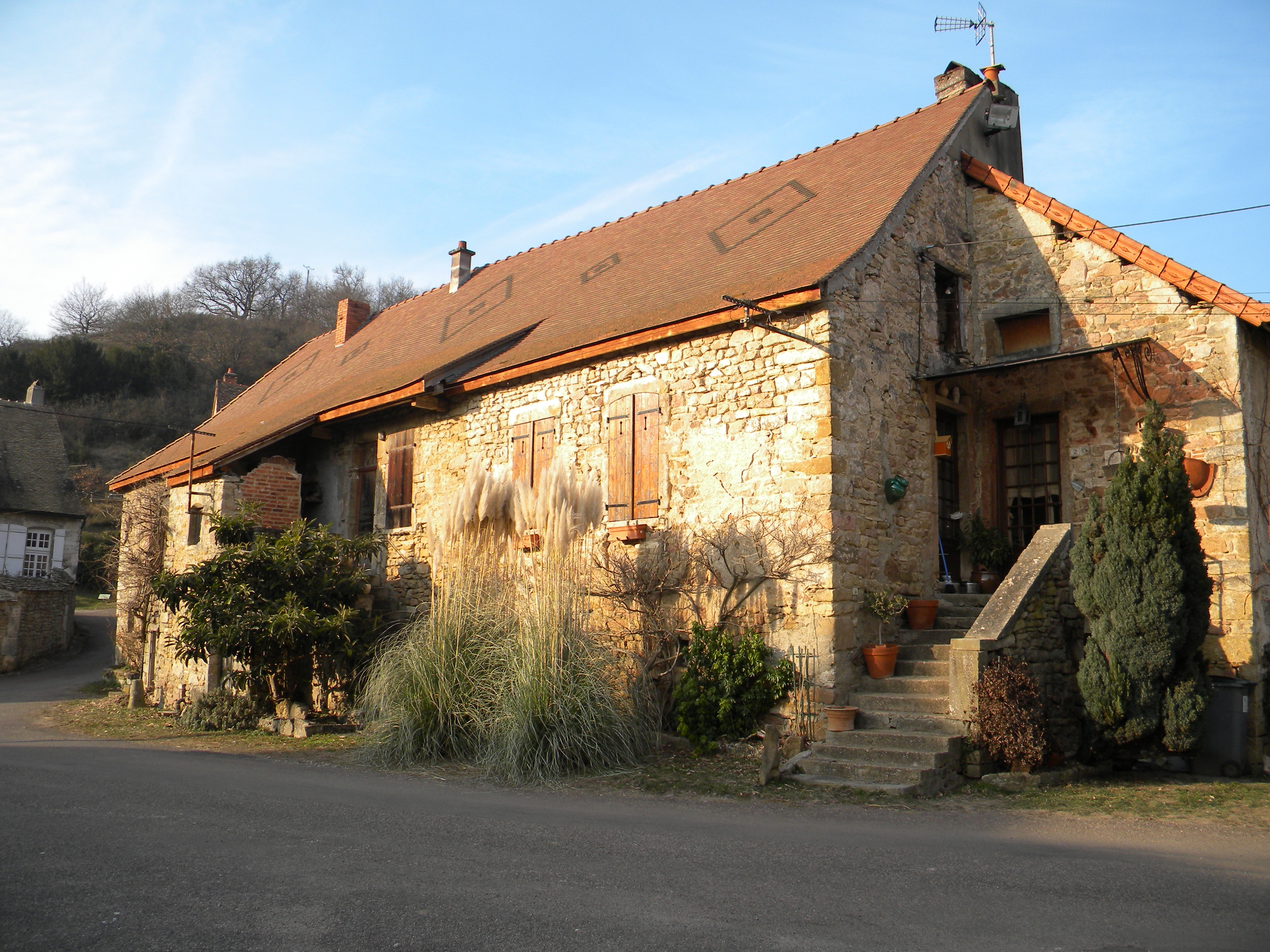 Maison